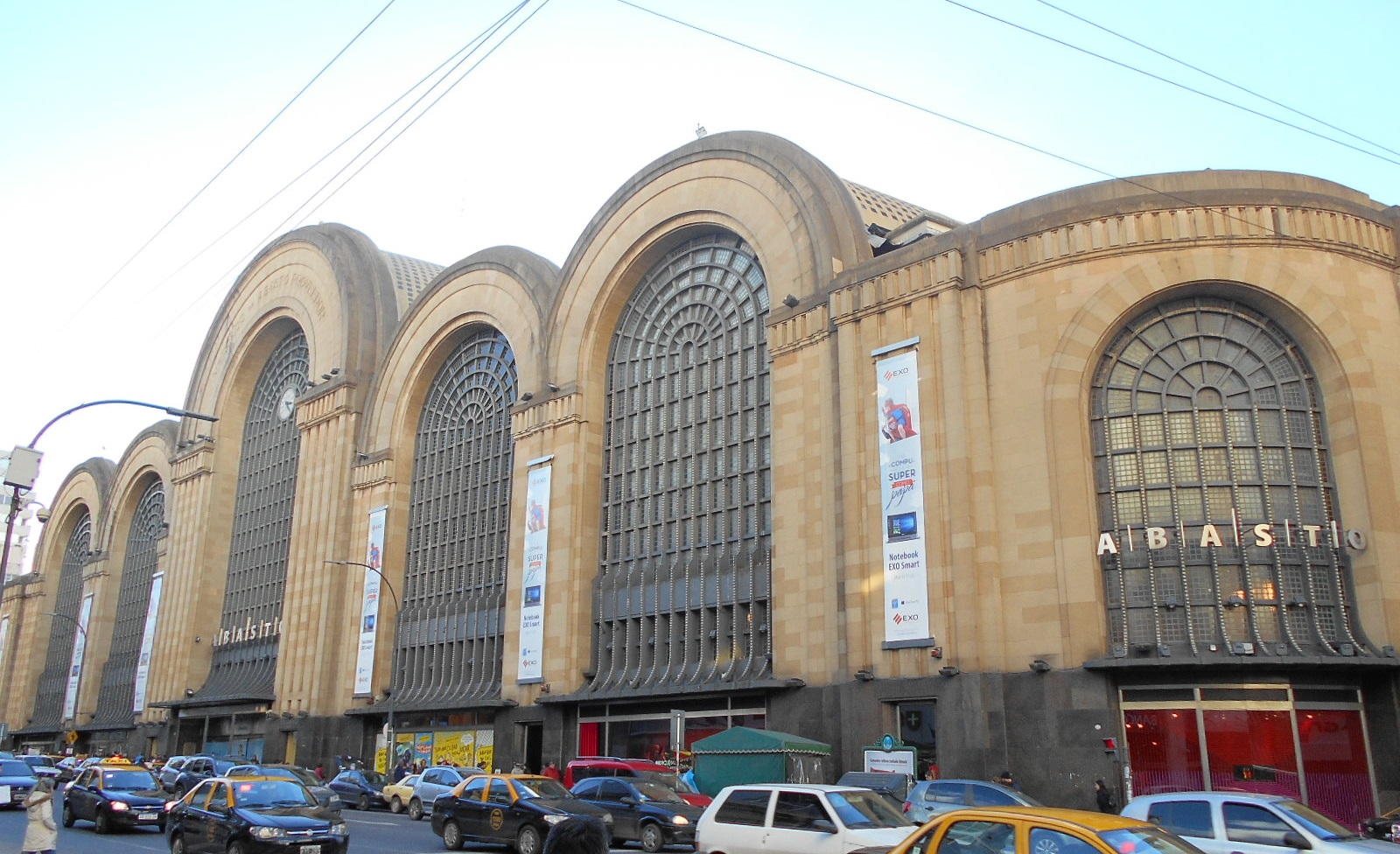 Abasto